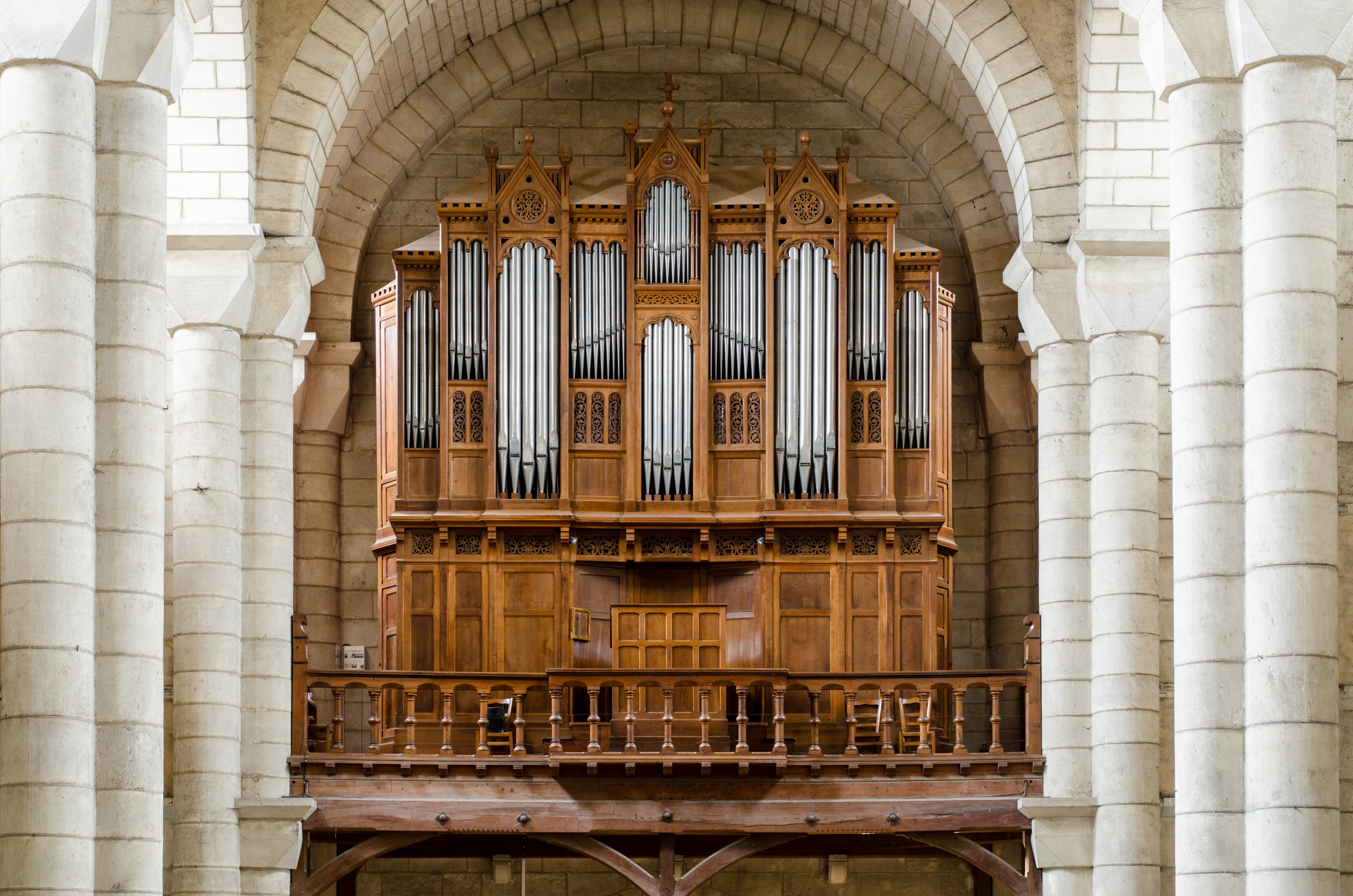 L'orgue de l'église saint Hilaire-le-Grand à Poitiers (Vienne, France), construit en 1884 par Gaston Maille, modifié par Louis Debierre en 1902, restauré par Gérard Bancells en 2006.